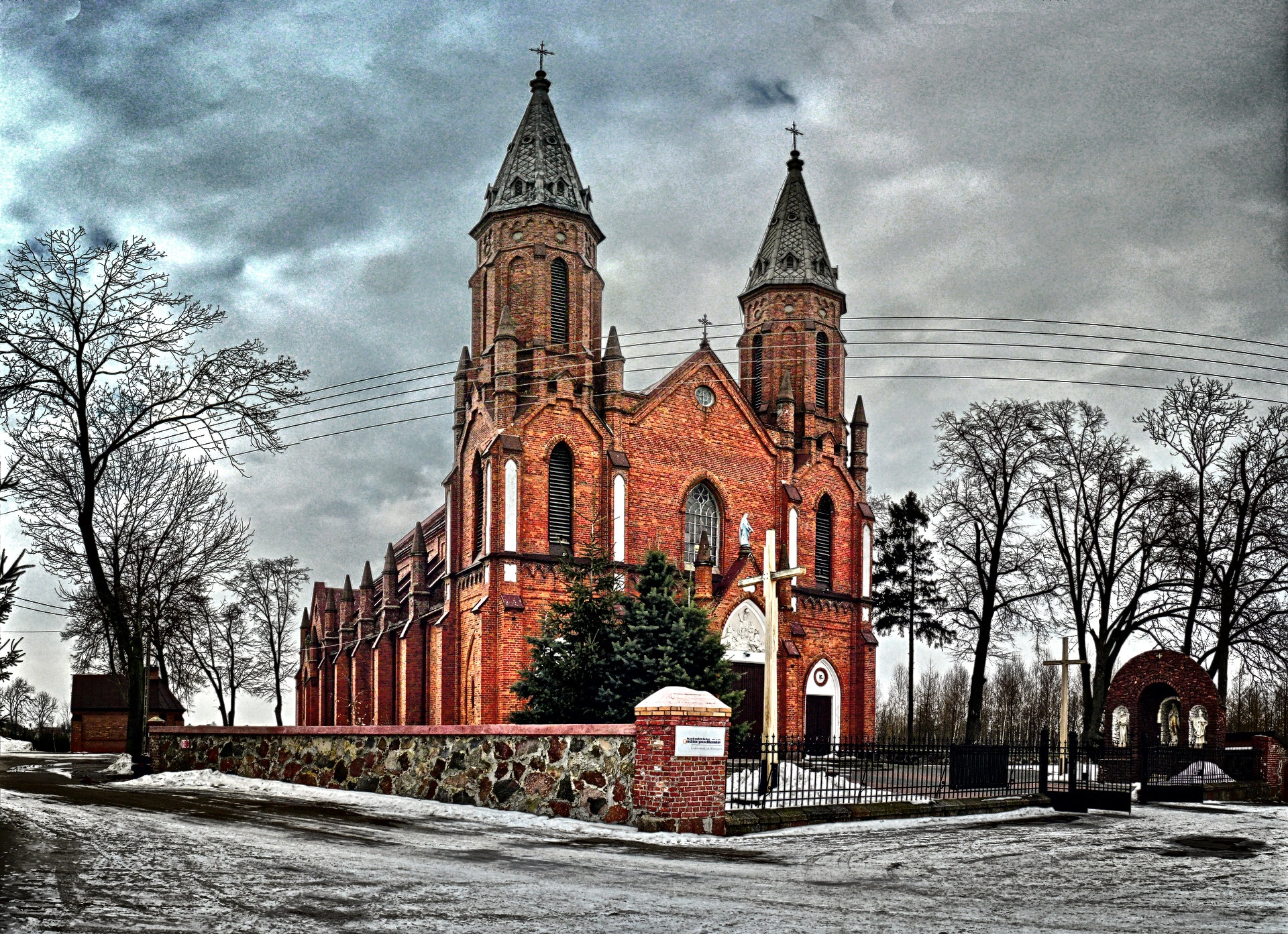 kościół parafialny pw. Najświętszego Serca Pana Jezusa w Wojcieszkowie, powiat łukowski, woj. lubelskie.